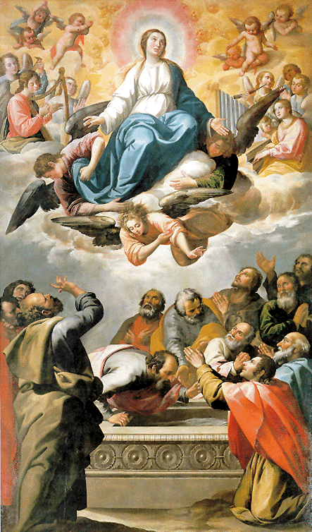 La obra representa la Asunción de la Virgen María, madre de Jesucristo, en cuerpo y alma a los Cielos.